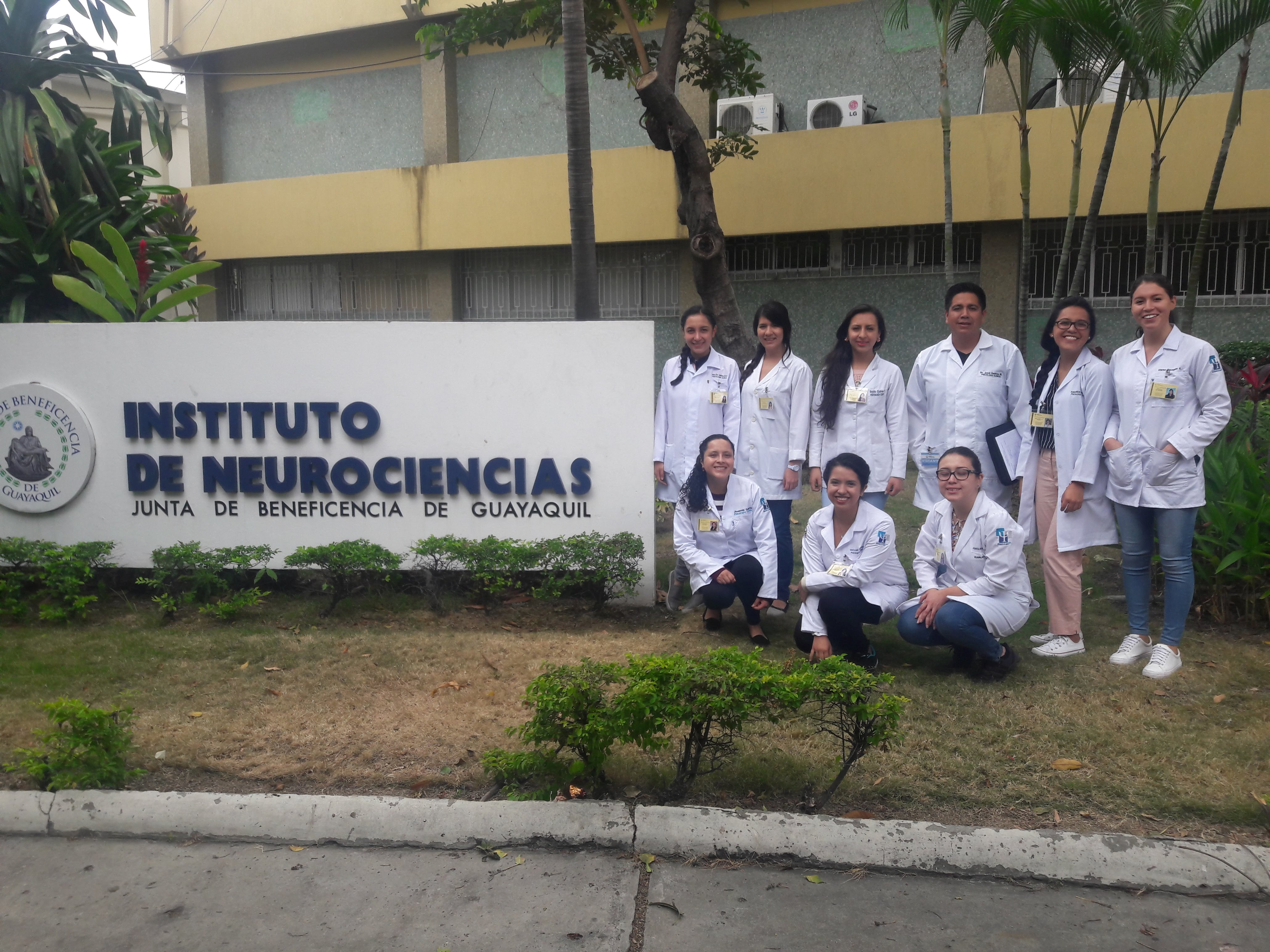 Neuroanatomía